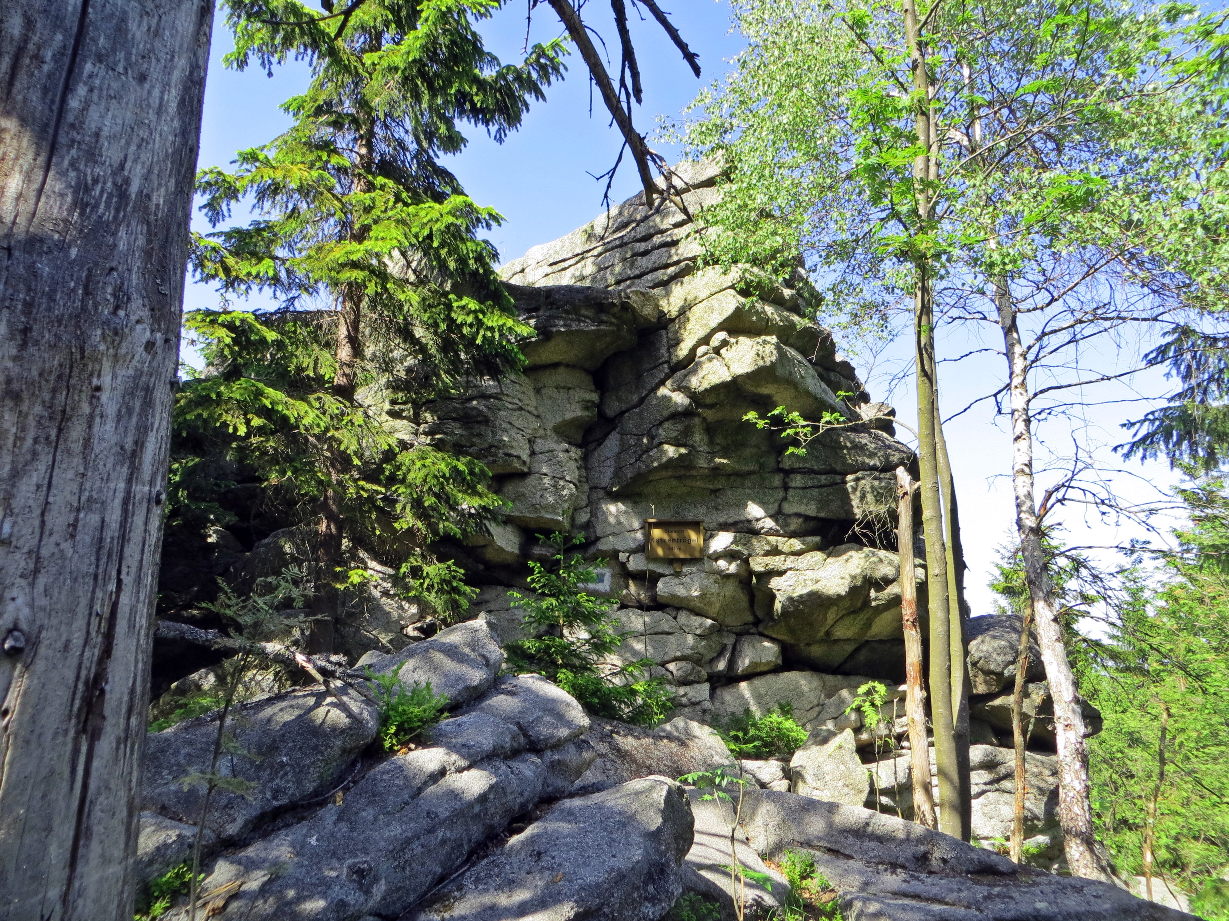 Der 941m hohe Katzentrögel